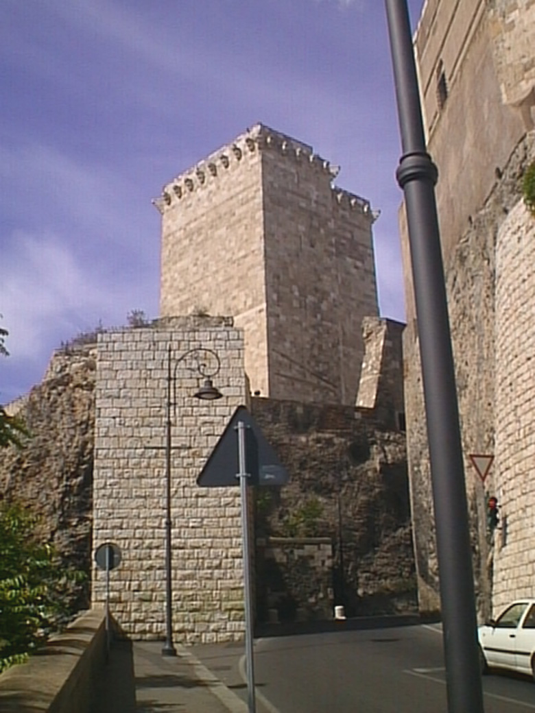 Torre di San Pancrazio, XIV secolo, cagliari